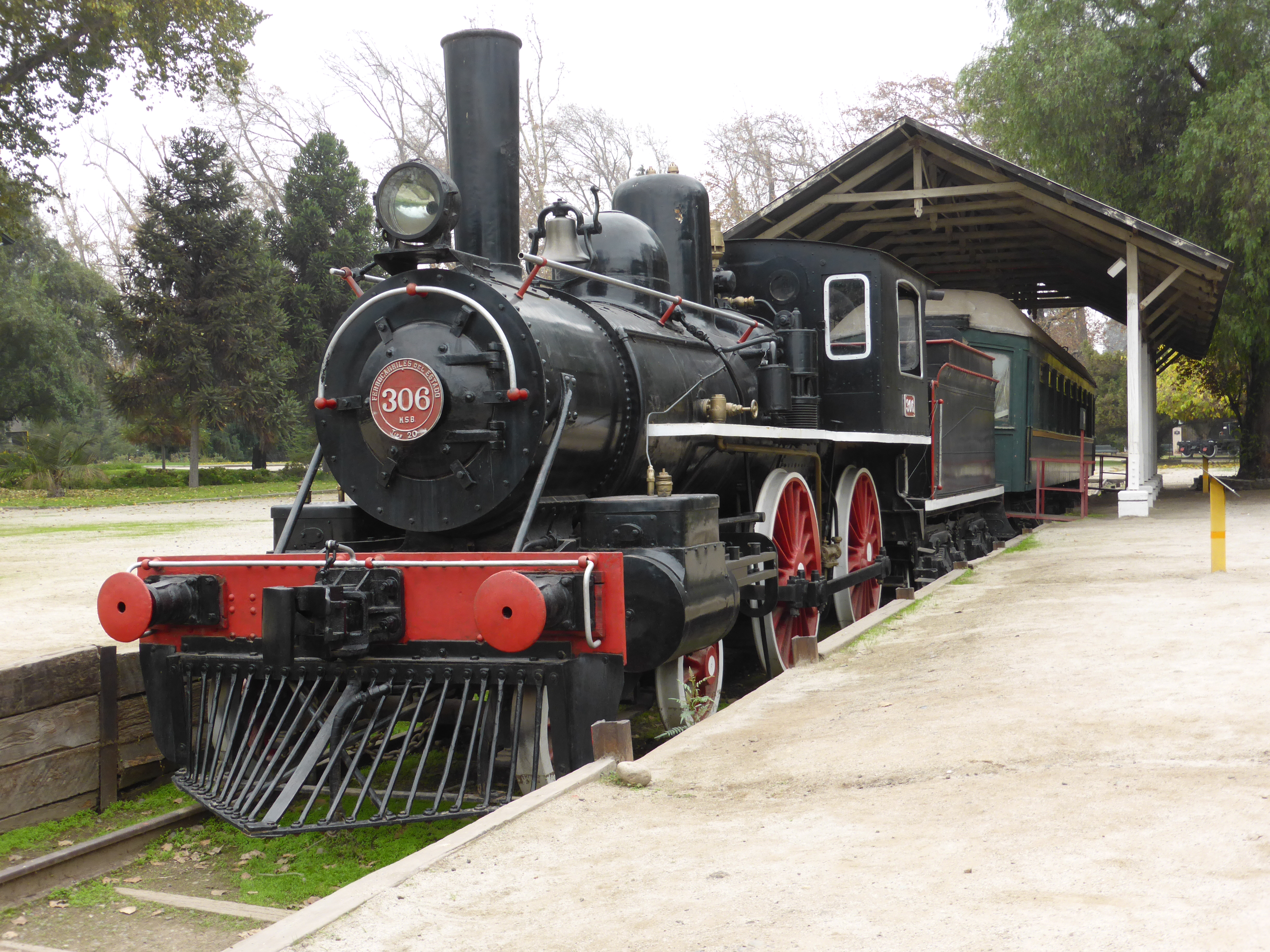 Locomotora de vapor, matrícula 306 de Ferrocarriles del Estado, con el típico rodaje norteamericano 220 (contando los ejes), o 440 (atendiendo al número de ruedas). Seguidamente vemos el coche presidencial, bajo una nueva cubierta o marquesina, que lleva un cartel o rótulo procedente de la estación de Ñuñoa (barrio o comuna de Santiago). El coche presidencial es de la misma época que la locomotora, pues fue fabricado por Pullman Car hacia el año 1910. La propia locomotora fue construida en Chile, en 1911, en la antigua maestranza y astilleros de Caleta Abarca (de Viña del Mar); establecimiento que inicialmente se llamaba "Lever, Murphy & Co.", luego Sociedad Fundición de Chile, y finalmente "Sociedad de Maestranzas y Galvanización".